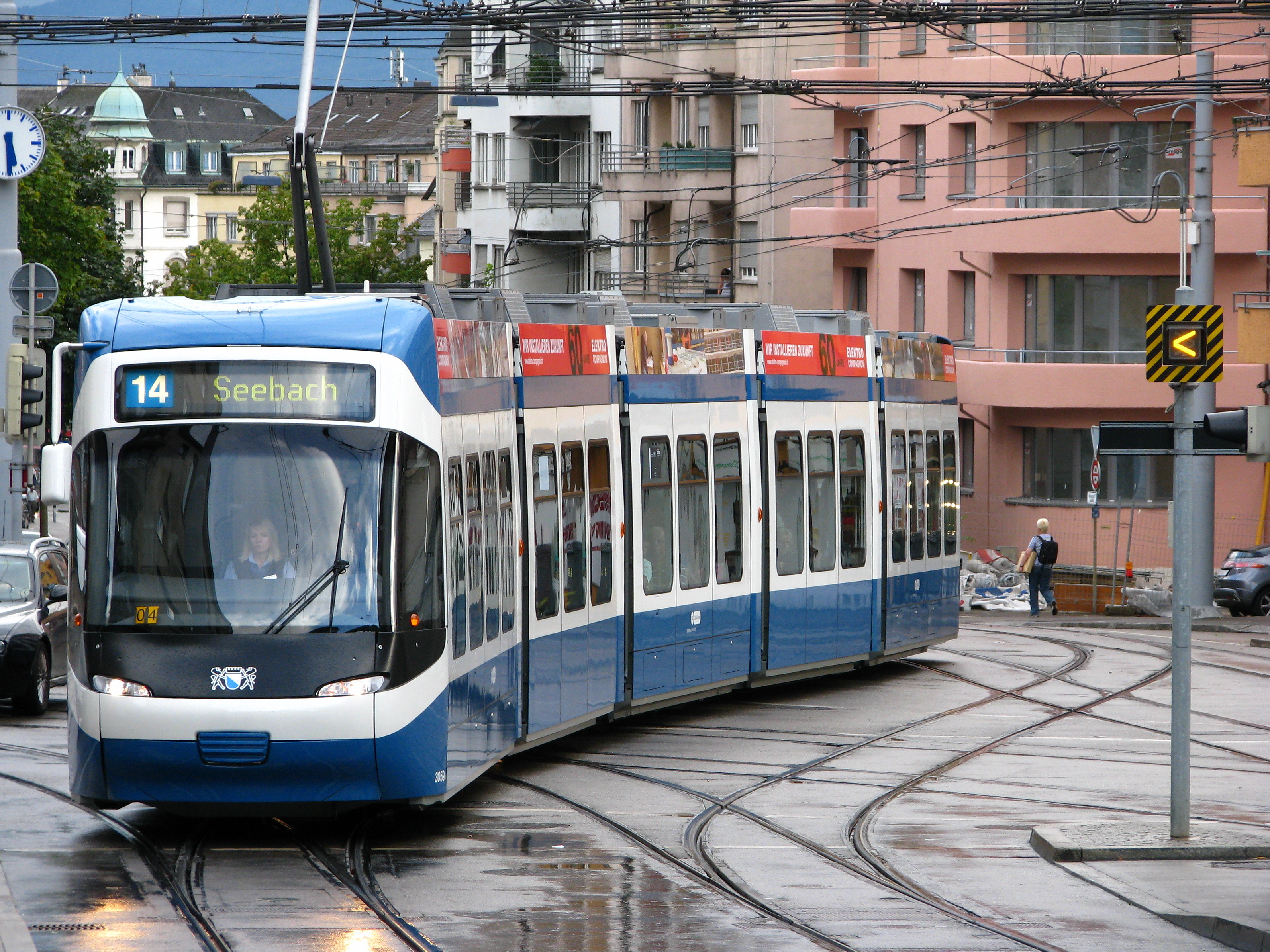 Cobra tram at Schaffhauserplatz in Zürich-Unterstrass